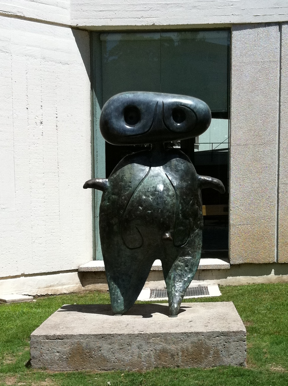 Fundació Joan Miró exterior views Personatge 1970